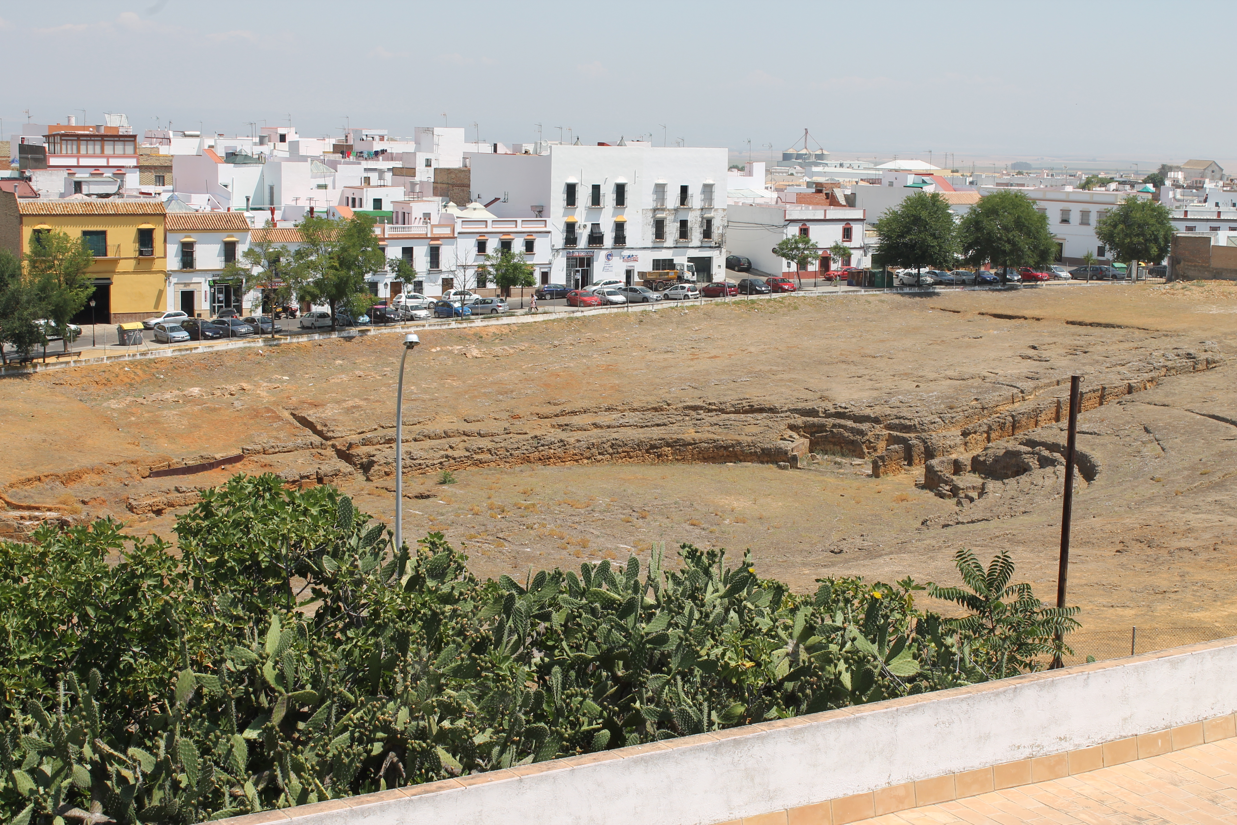 Anfiteatro romano de Carmona visto desde la terraza del museo de la necropolis.